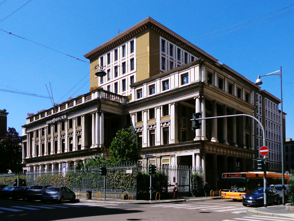 Milano, l’ex sede direzionale Snia Viscosa in corso di Porta Nuova 7 (angolo via Montebello 18 e via Cernaia 8-12). L’edificio fu costruito dal 1960 al 1968 su progetto di Antonio Cassi Ramelli.